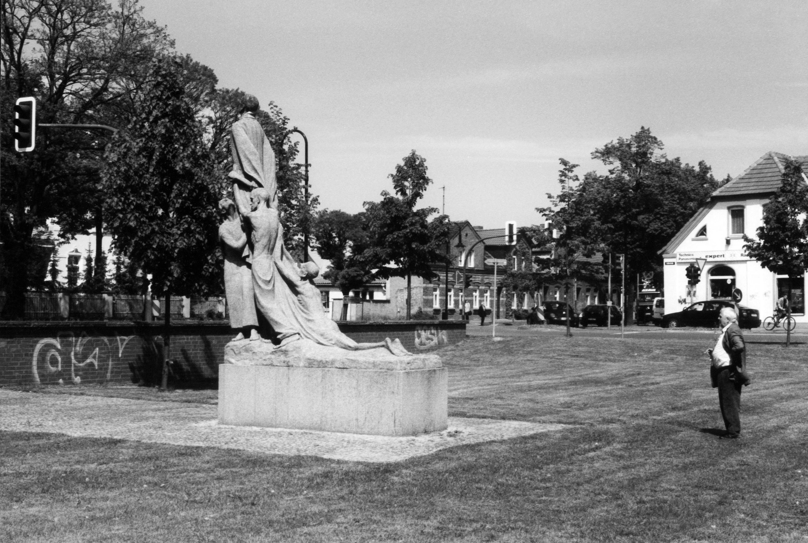 "Mahnmal für die Opfer des Faschismus in Gardelegen". Rudolf Wewerka, 1950. Auf dem Foto Stefan Wewerka. Foto Alexander Wewerka.